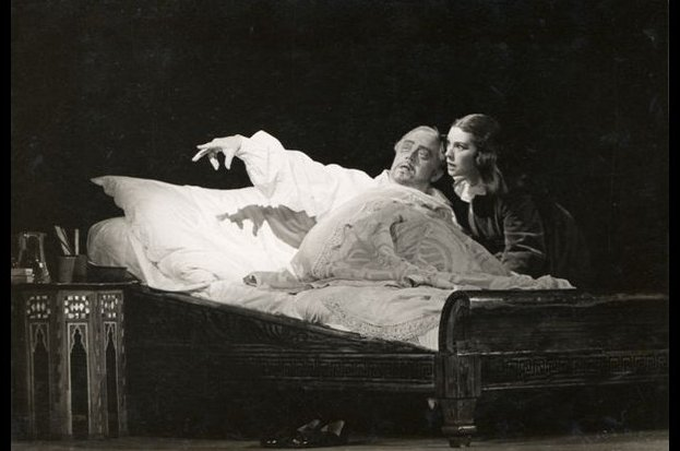 O'Neill, Eugene: Amerikai Elektra. Nemzeti Színház. Bemutató: 1937.02.28. Rendező: Németh Antal. Szereplők: Ezra Mannon: Csortos Gyula, Lavinia: Bajor Gizi.